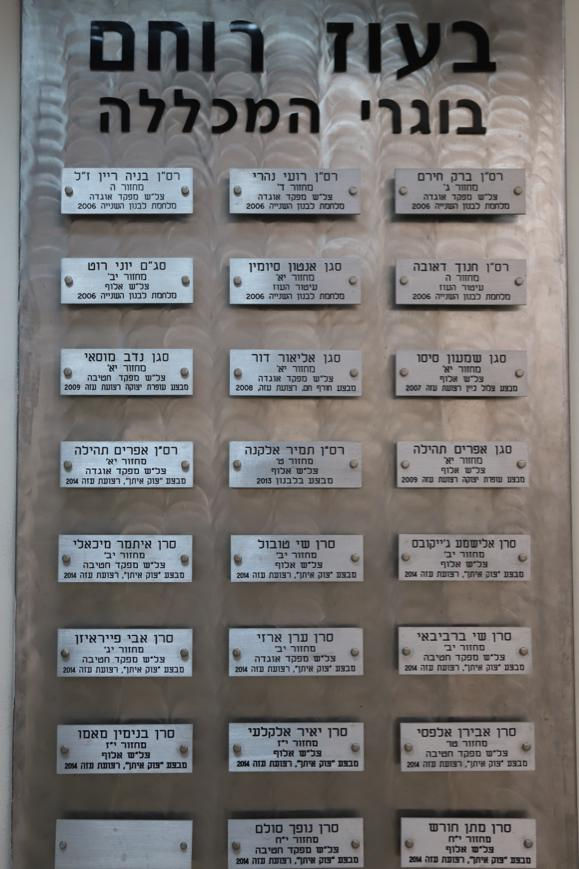 צל"שים בוגרי המלטק